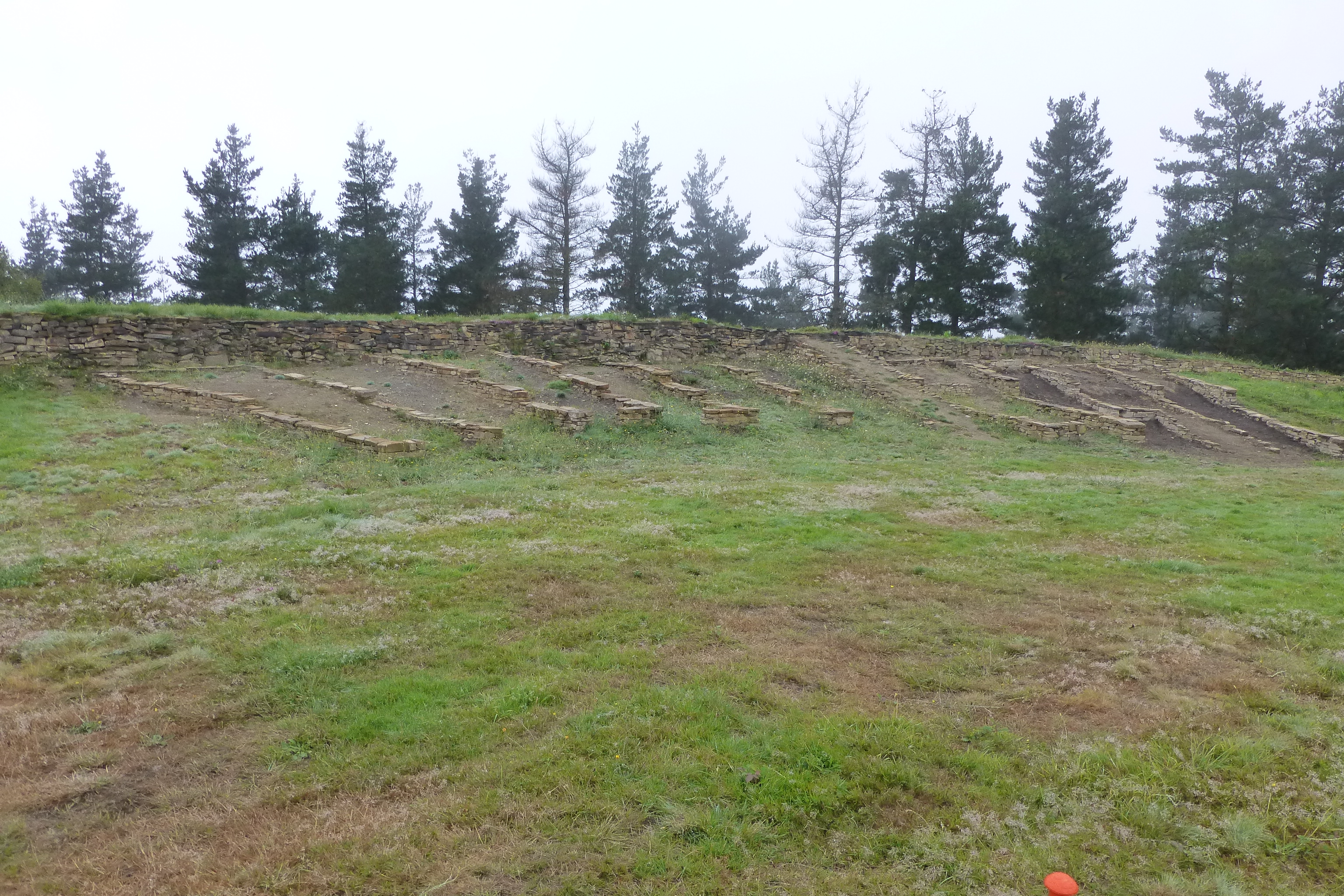 Castro de Arrola u oppidum de Marueleza en Bizkaia, País vasco (España). Extremo NNW.